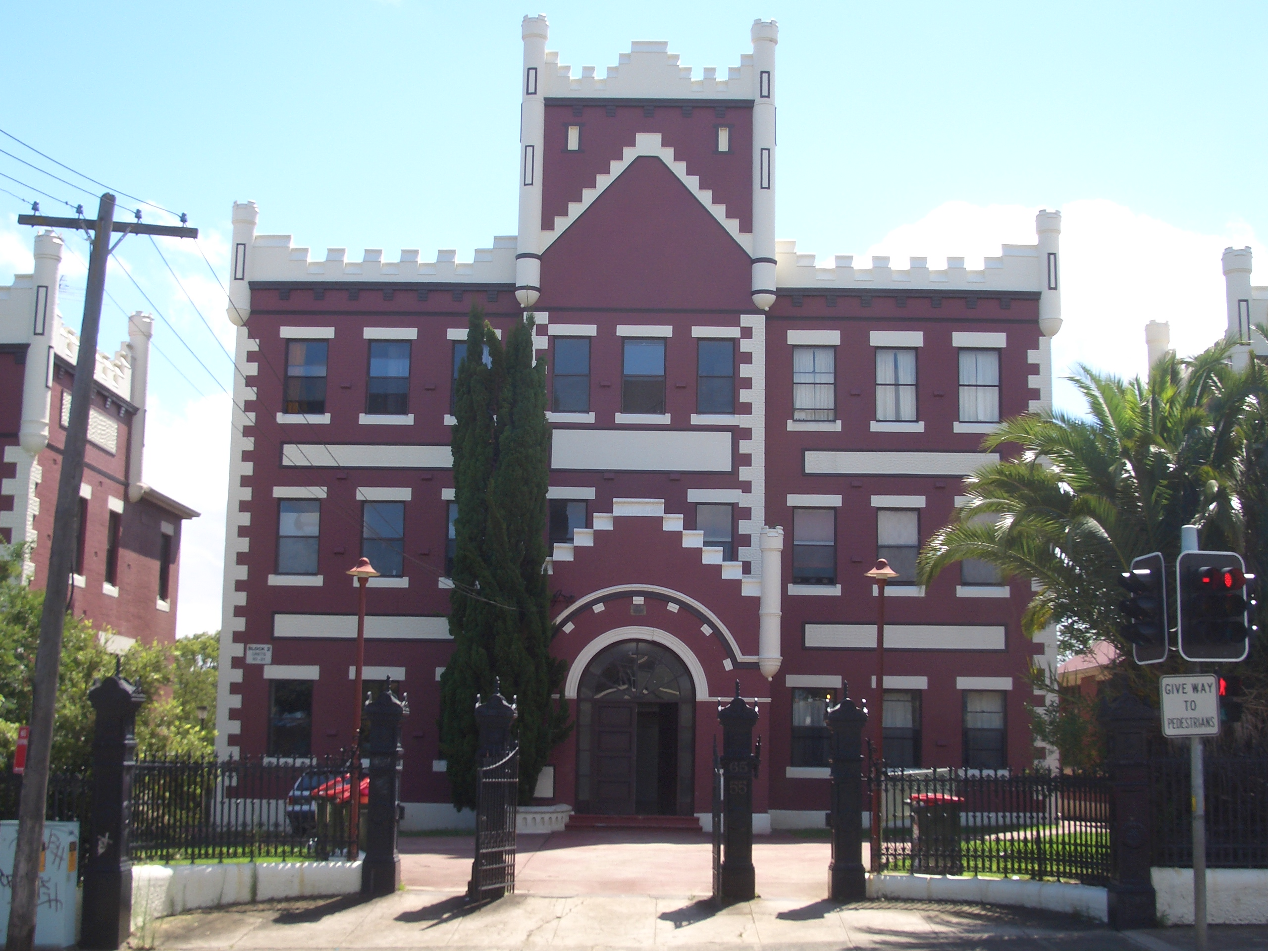 Marrickville flats, Livingstone Road